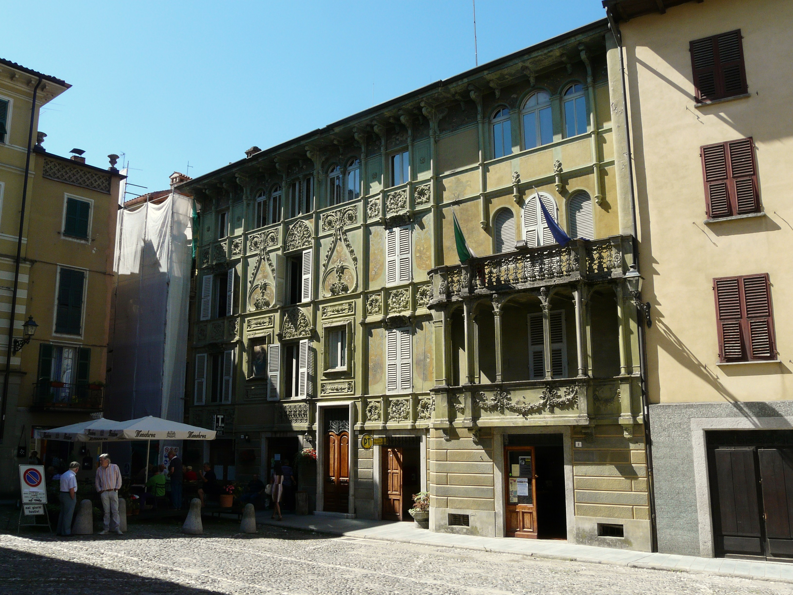 Palazzo Mazza Galanti, sede della Comunità Montana Terre del Giarolo e del municipio di San Sebastiano Curone, Piemonte, Italia